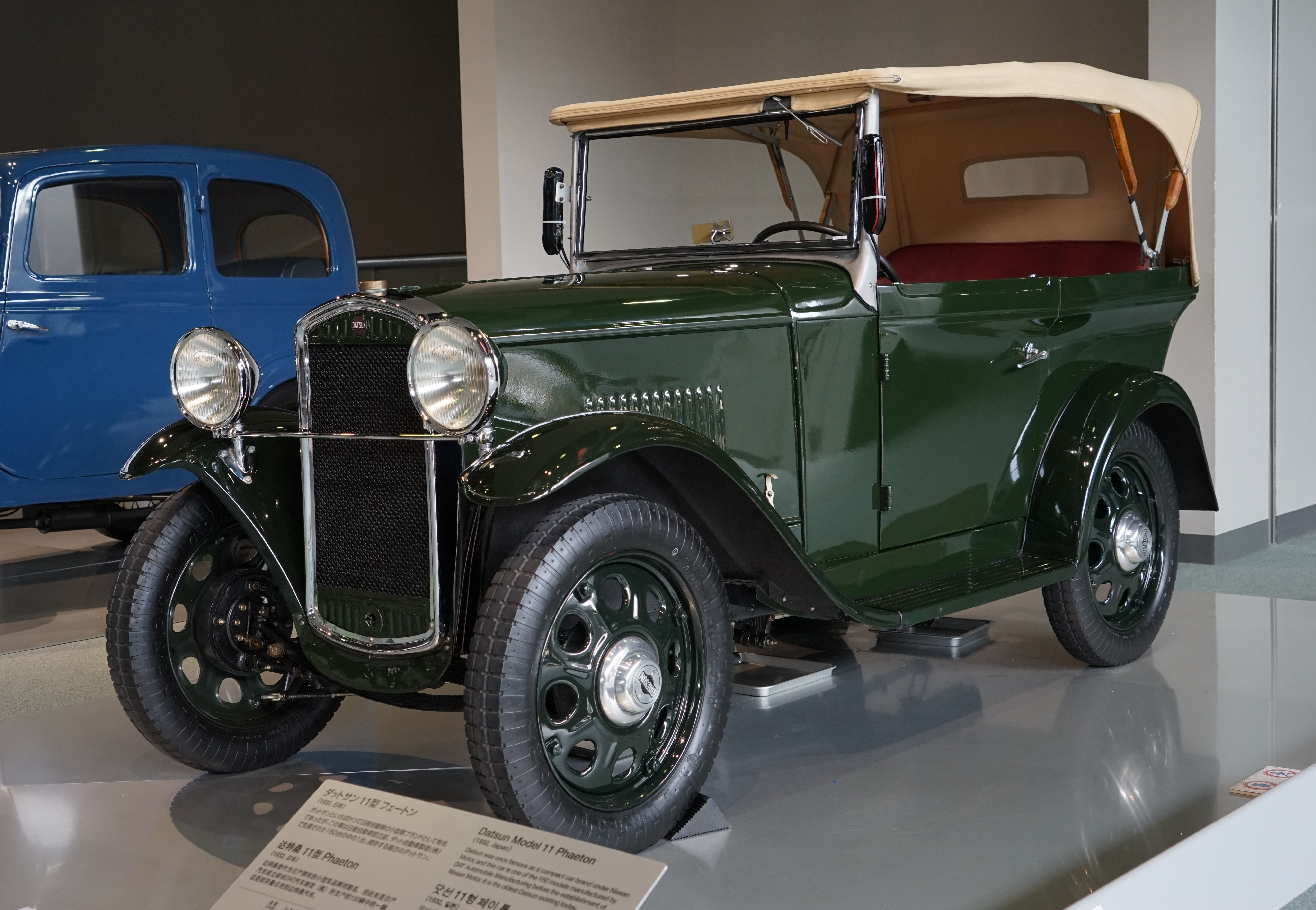 2015年9月19日、トヨタ博物館にて本人撮影